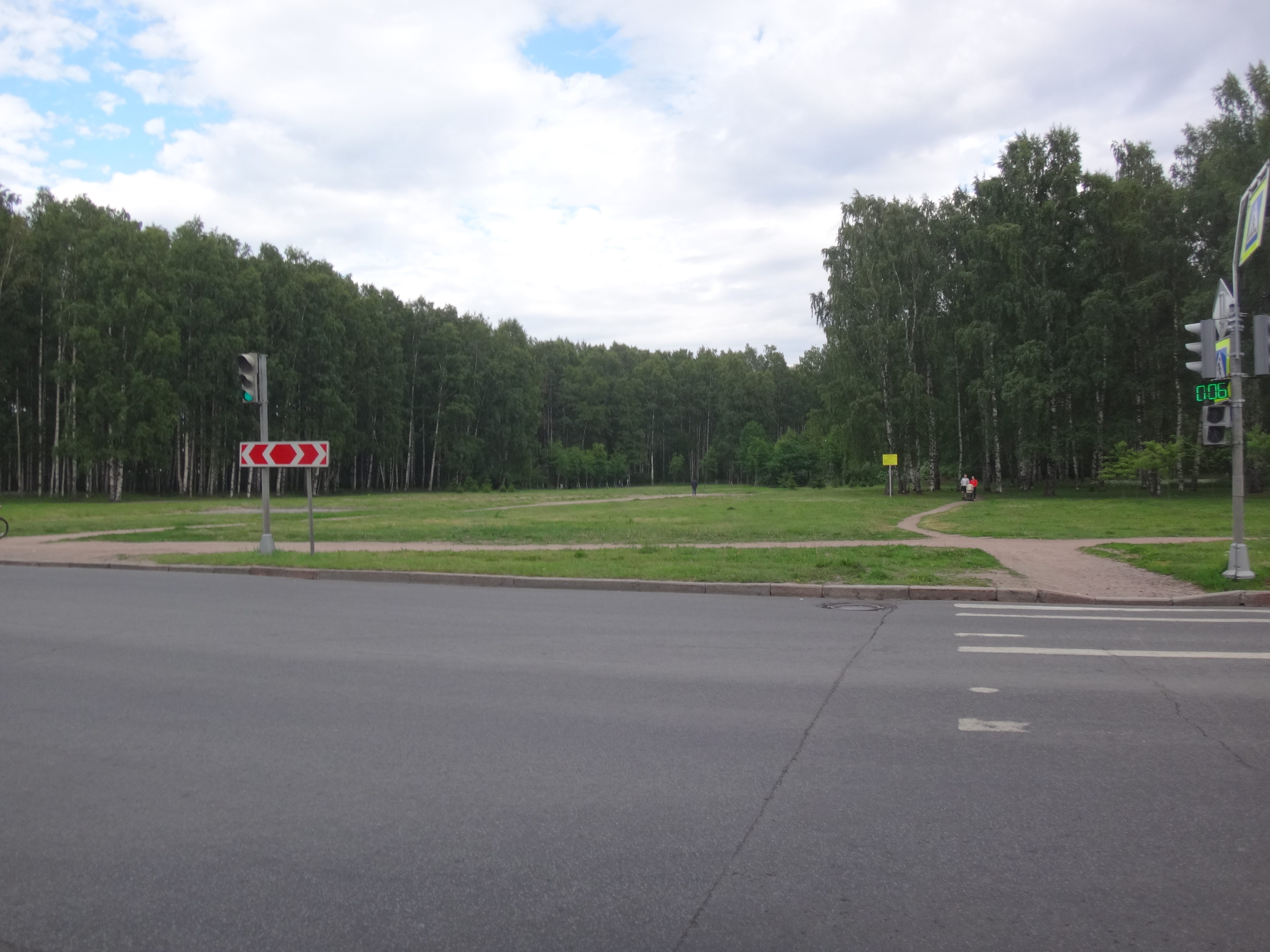 Пискарёвский лесопарк